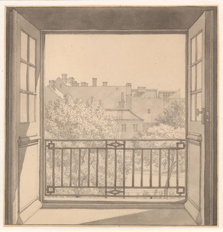 C.W. Eckersberg (1783-1853), Udsigt fra Kuppelsalen paa Charlottenborg over botanisk have, 1845